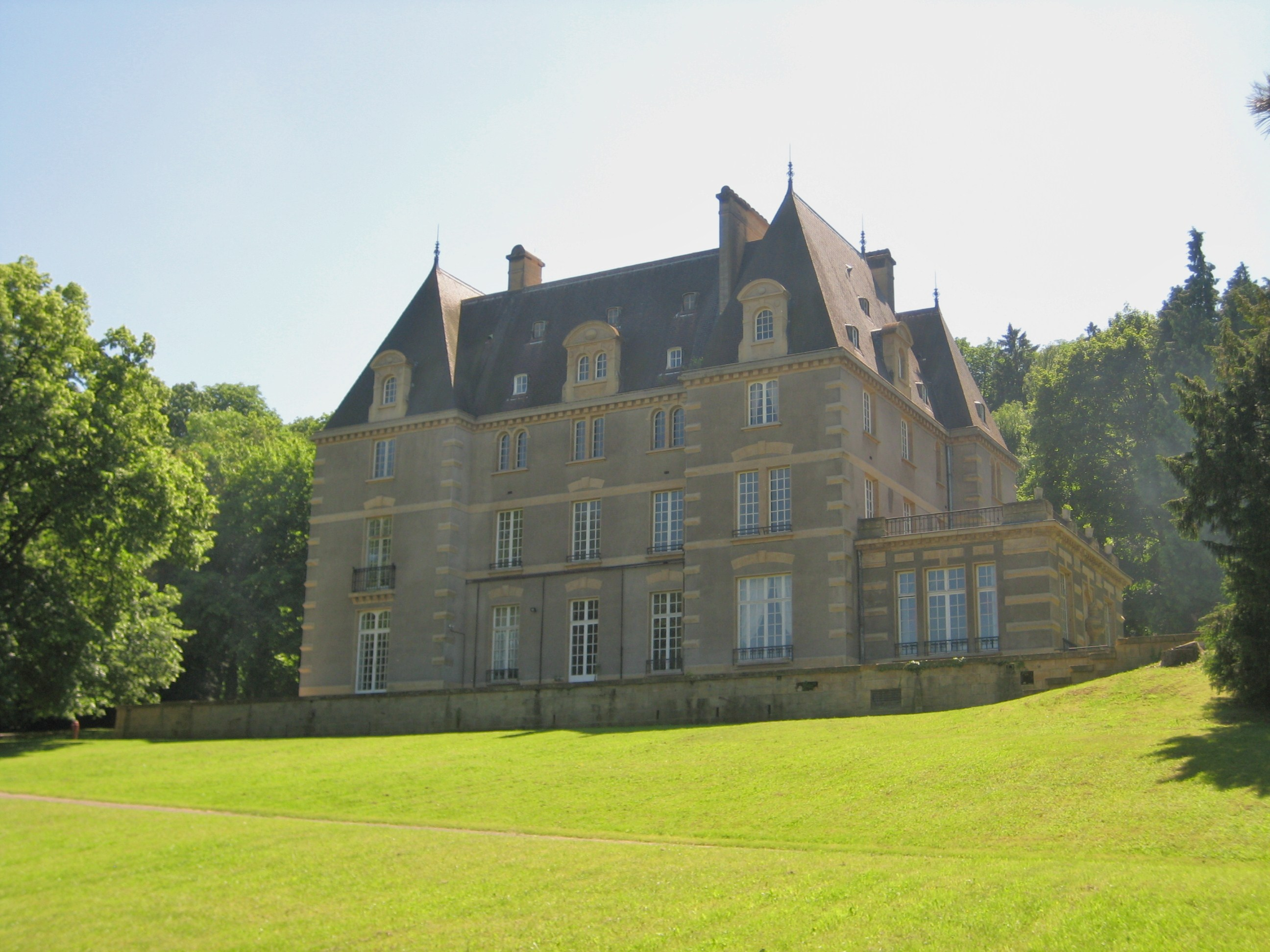 Description Château de Tournebride, Hayange — le Château Guy de Wendel, encore appelé le Château du Tournebride, a été construit en 1906 par Guy de Wendel (1878-1955), fils de Robert de Wendel (1847-1903). Voyez cet article. Date26 August 2011Sourcemon appareil photoAuthorAimelaimePermission(Reusing this file) Château de Tournebride, Hayange — le Château Guy de Wendel, encore appelé le Château du Tournebride, a été construit en 1906 par Guy de Wendel (1878-1955), fils de Robert de Wendel (1847-1903). Voyez cet article.